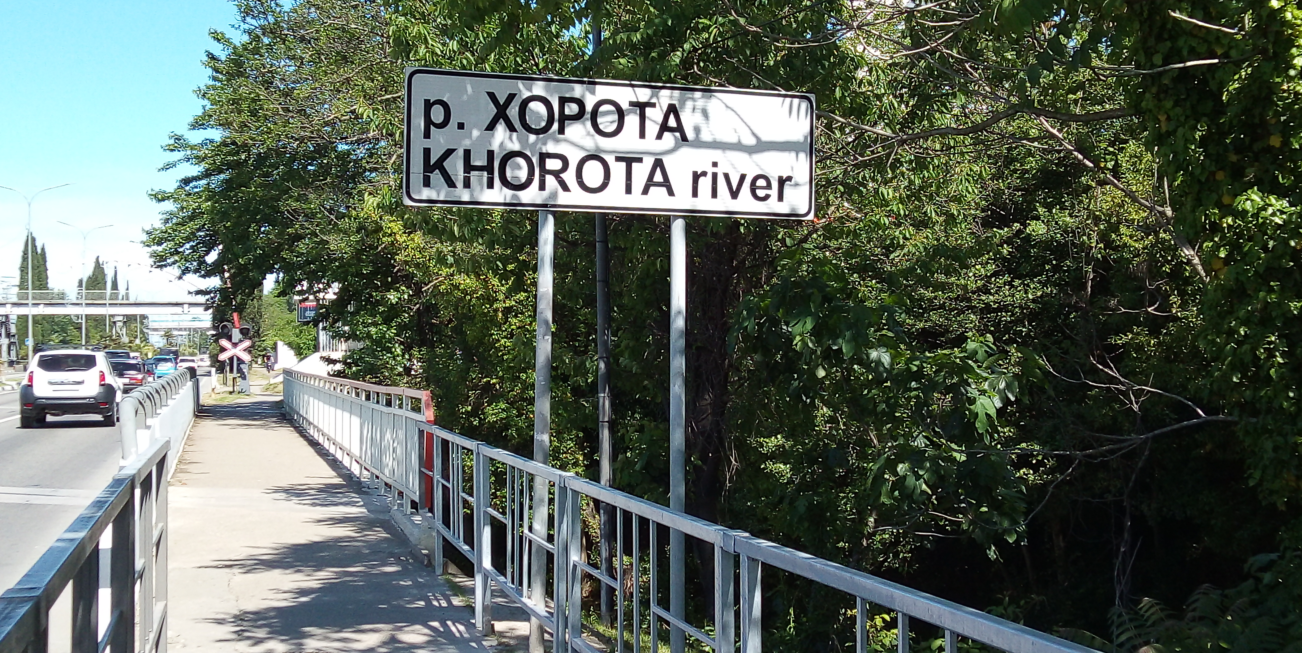 Дорожный указатель "р. Хорота" в мае 2020 года